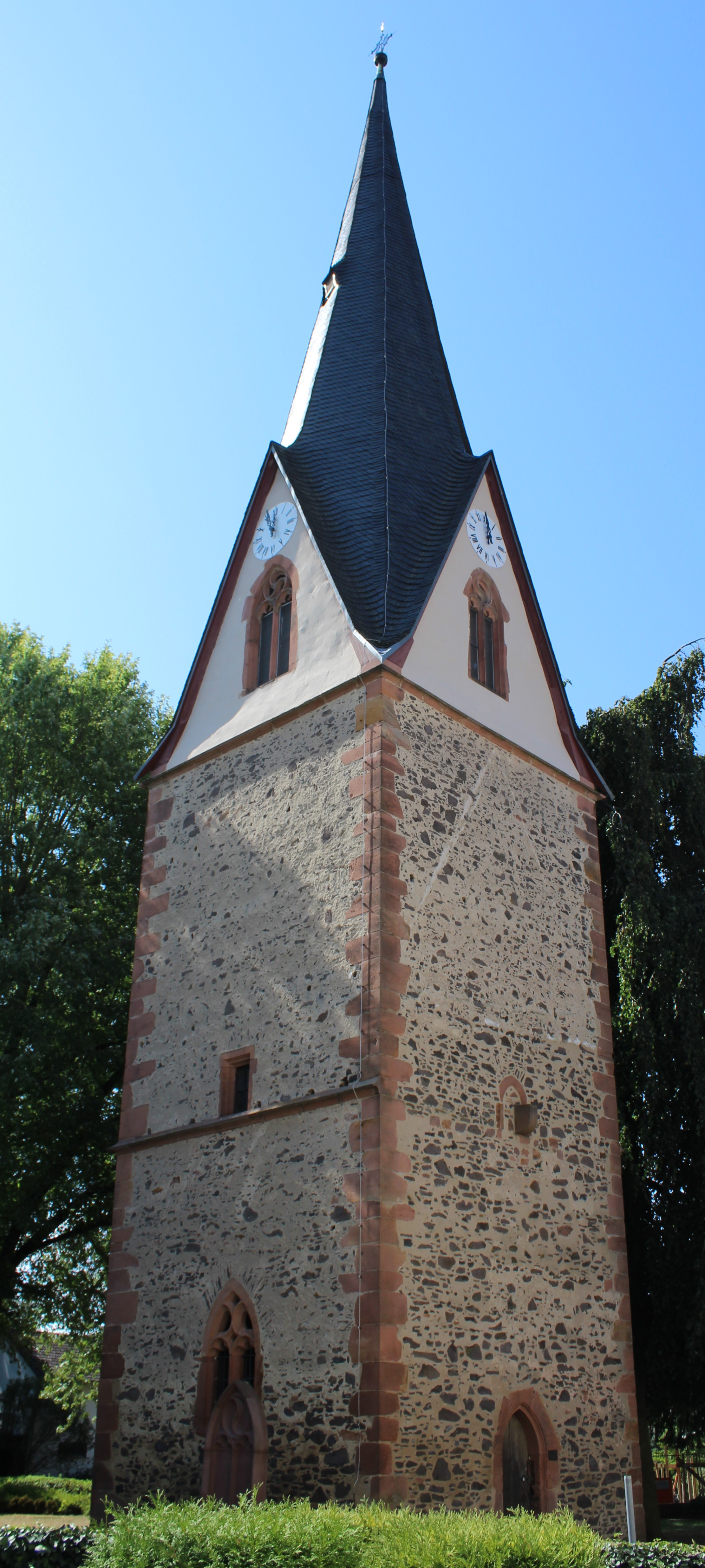 Johanniterturm Nidda, Wetteraukreis, Hessen, Deutschland